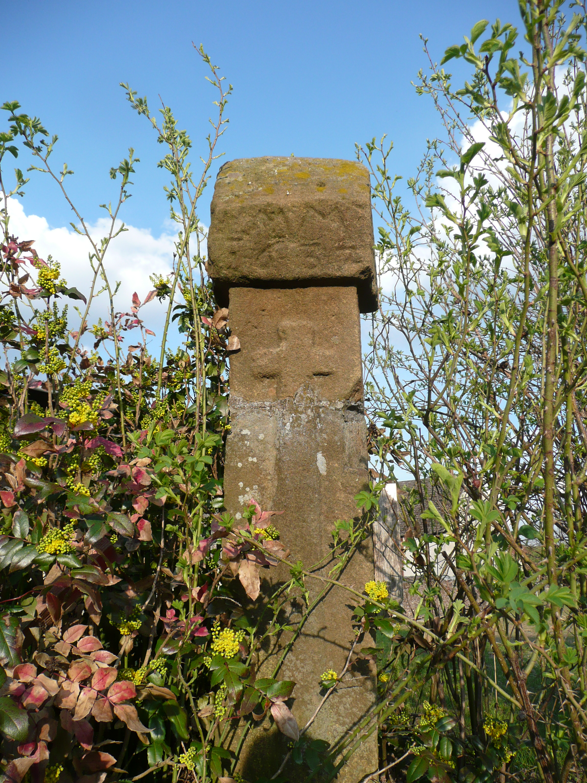 Schwedenmarter in Massenricht